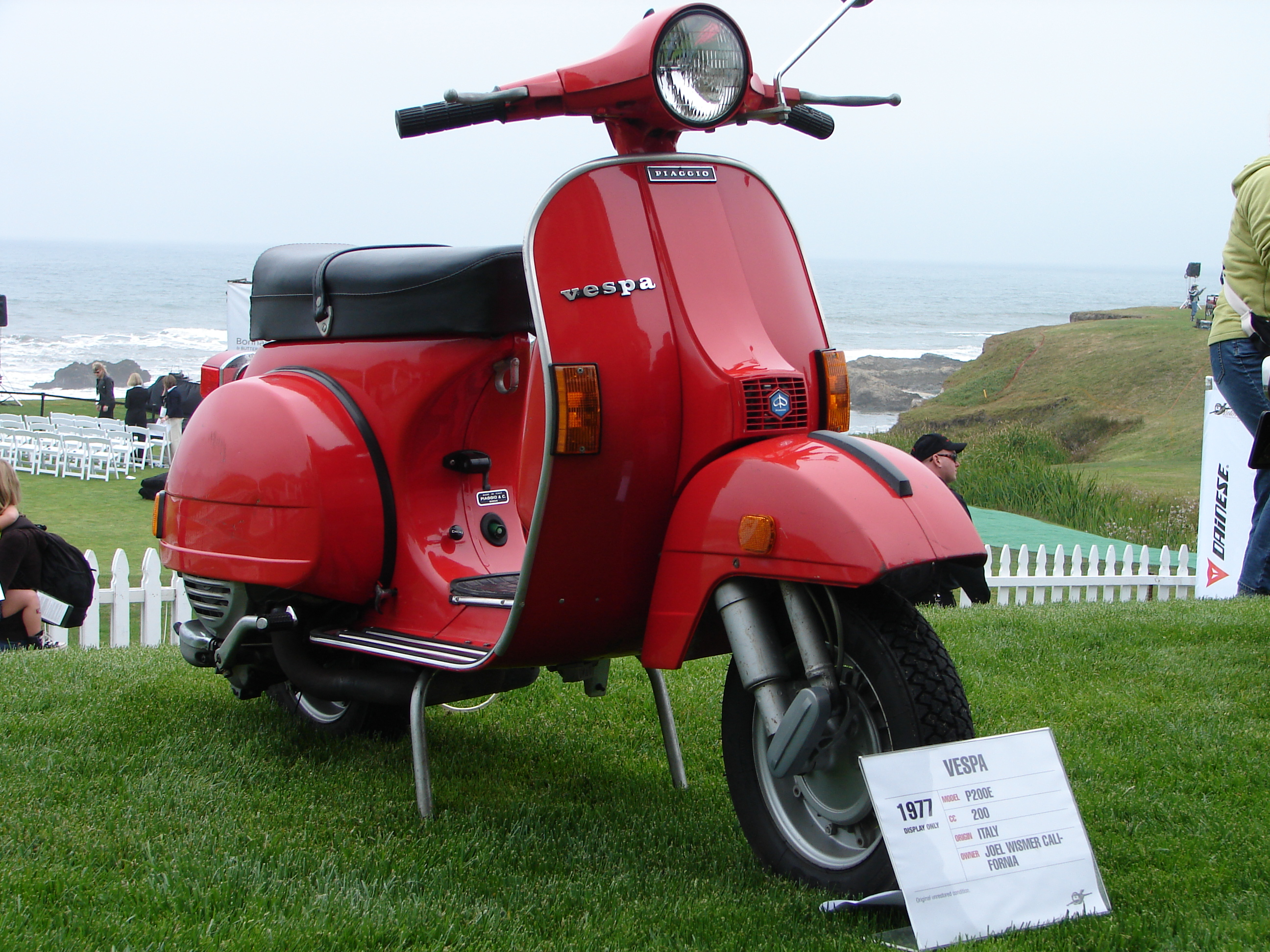 Classico 1977 Vespa P200E